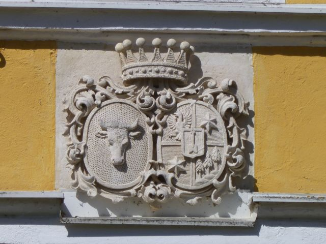 Schloss_Hagenau_-_Wappen_der_Handels_über_dem_Eingangstor